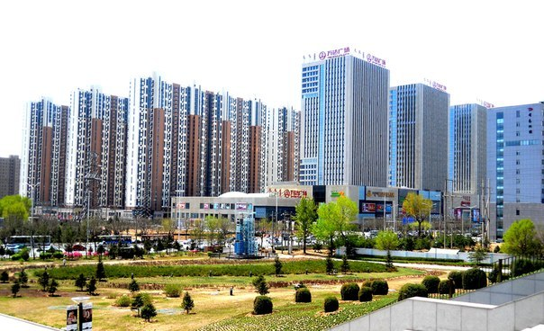 Свое фото